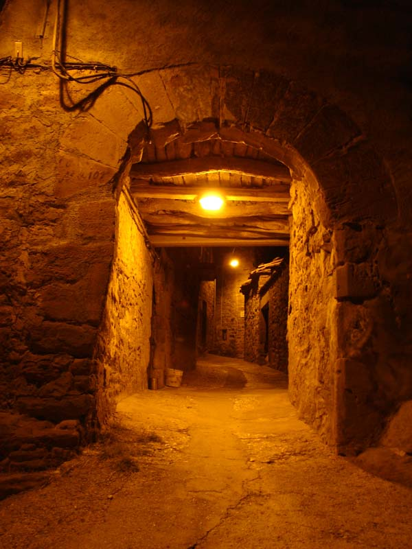 Portal dovellat que dona entrada a la vila closa.